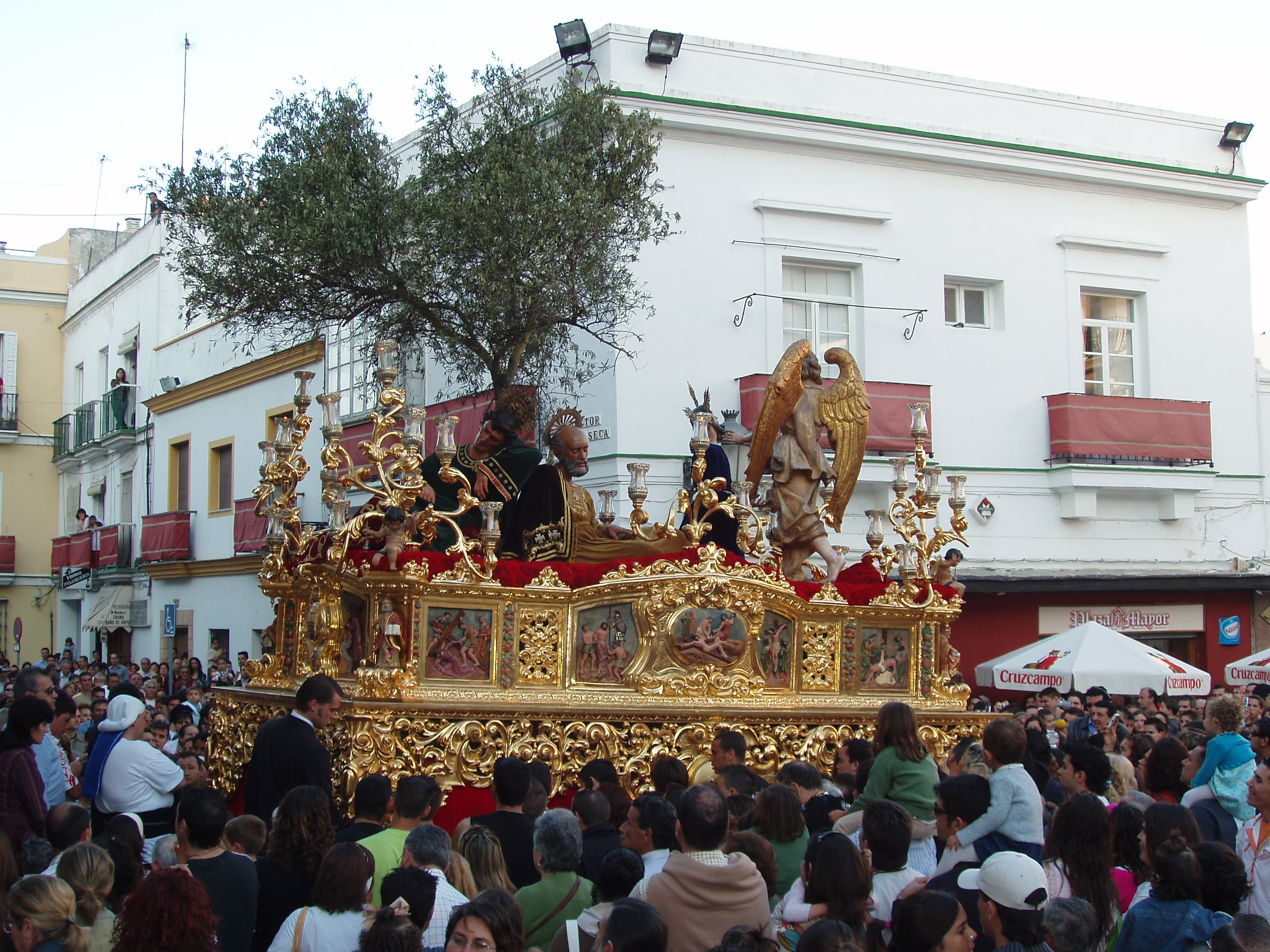 Paso de misterio de El Olivo. Miércoles Santo. Semana Santa en El Puerto de Santa María, Cádiz, España.